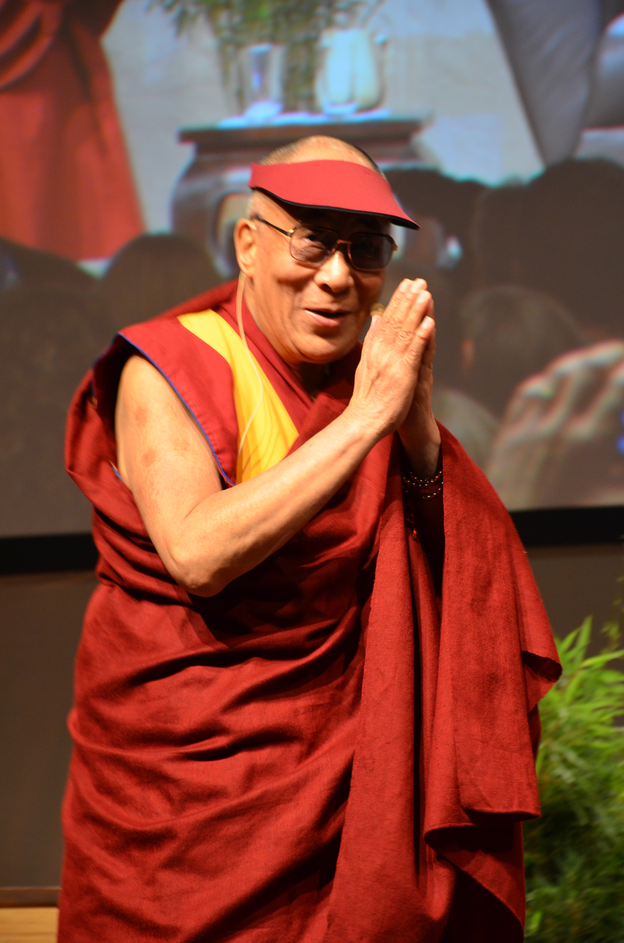 Der 14. Dalai Lama, Tenzin Gyatso, zugunsten des Hilfsprojektes future4children in der Swiss Life Hall in Hannover...